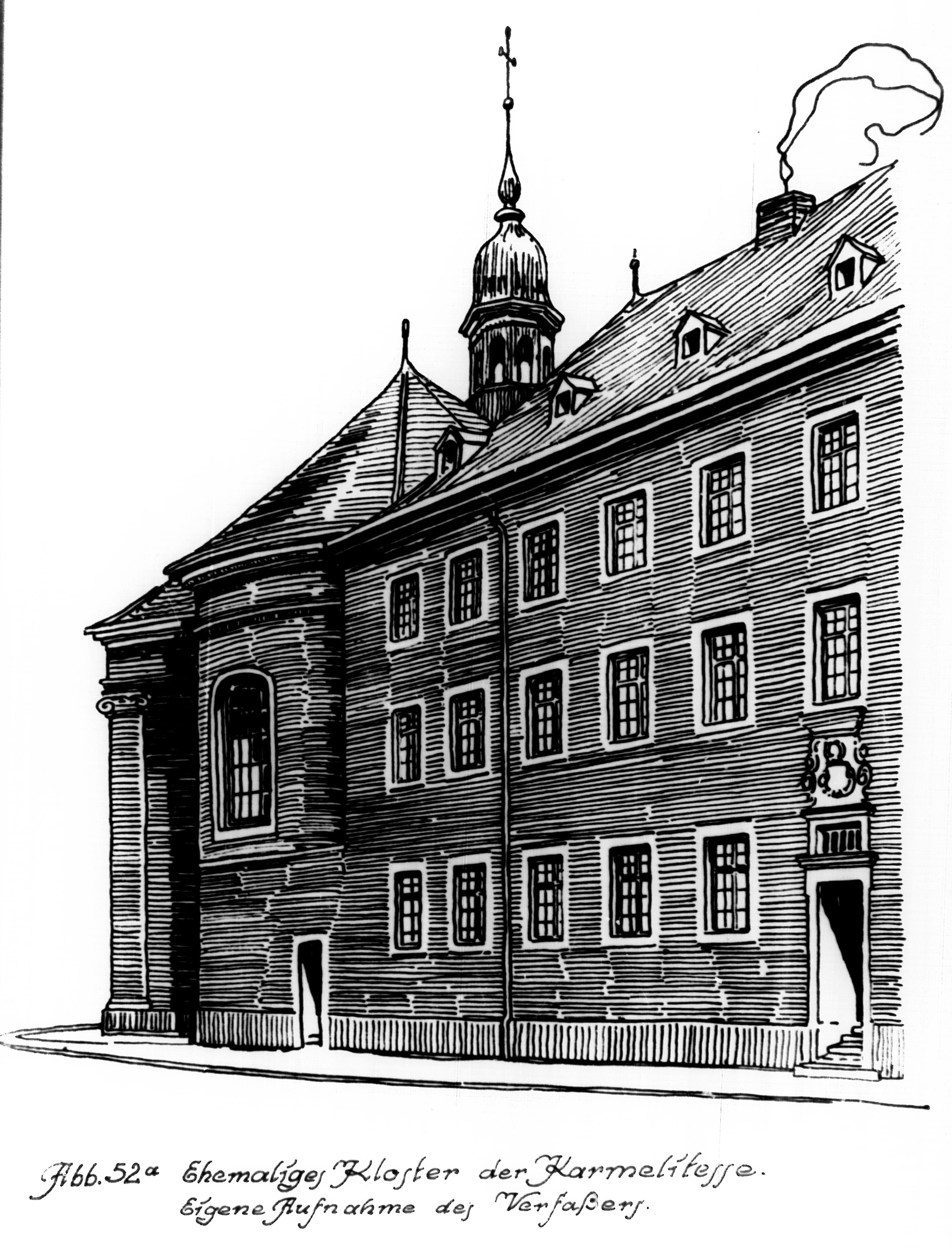 ehemaliges Kloster der Karmelitessen, daneben links die Josephskapelle